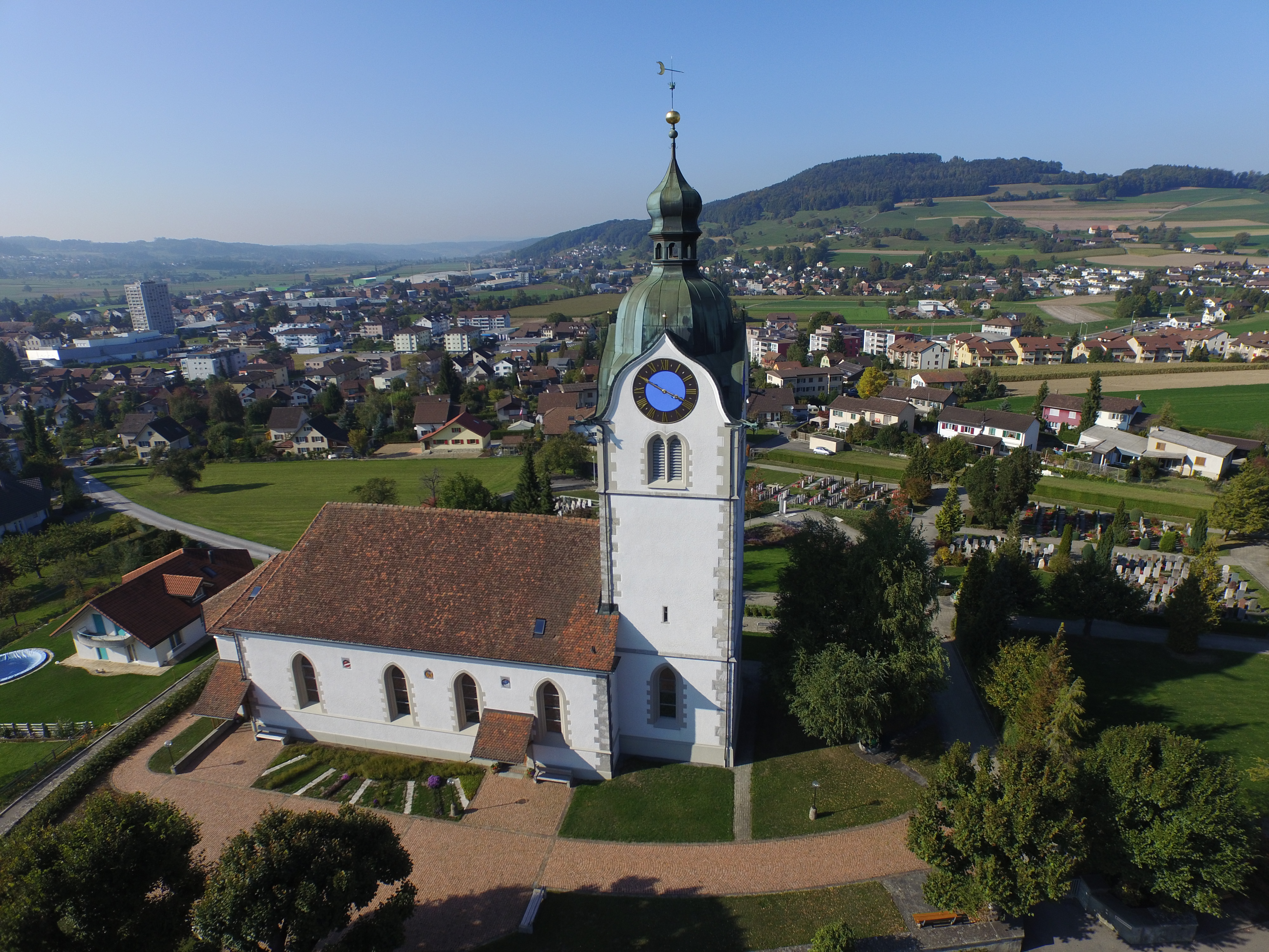 Reformierte Kirche Reinach AG mit Homberg im Hintergrund